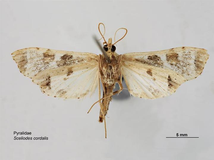 Sceliodes cordalis, ventral view.